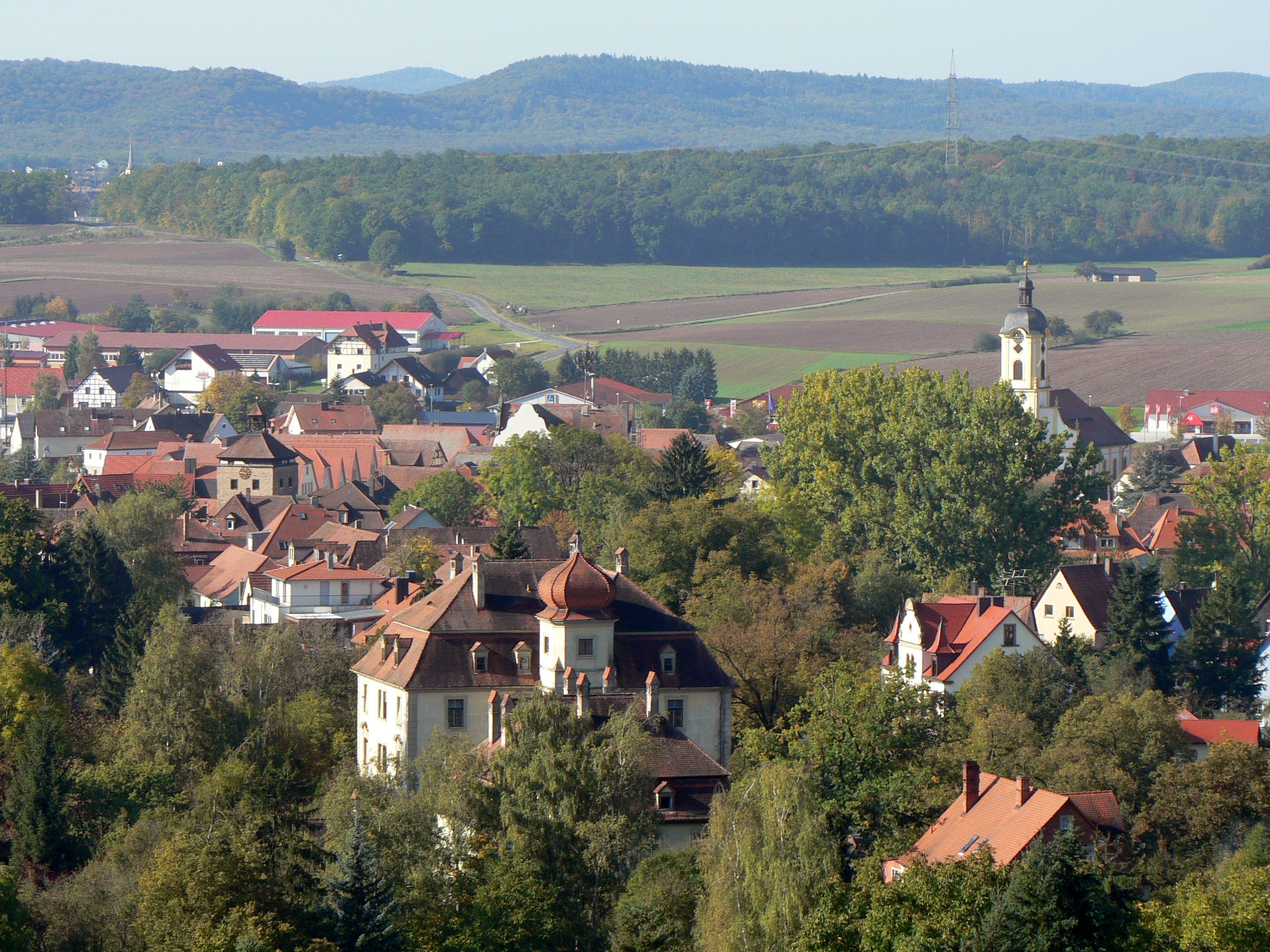 Ost-Ansicht von Scheinfeld